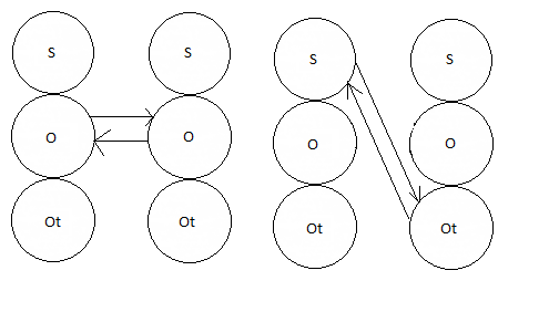 Komplementarne transakcije